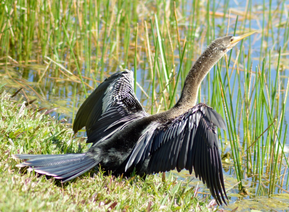 アメリカヘビウ